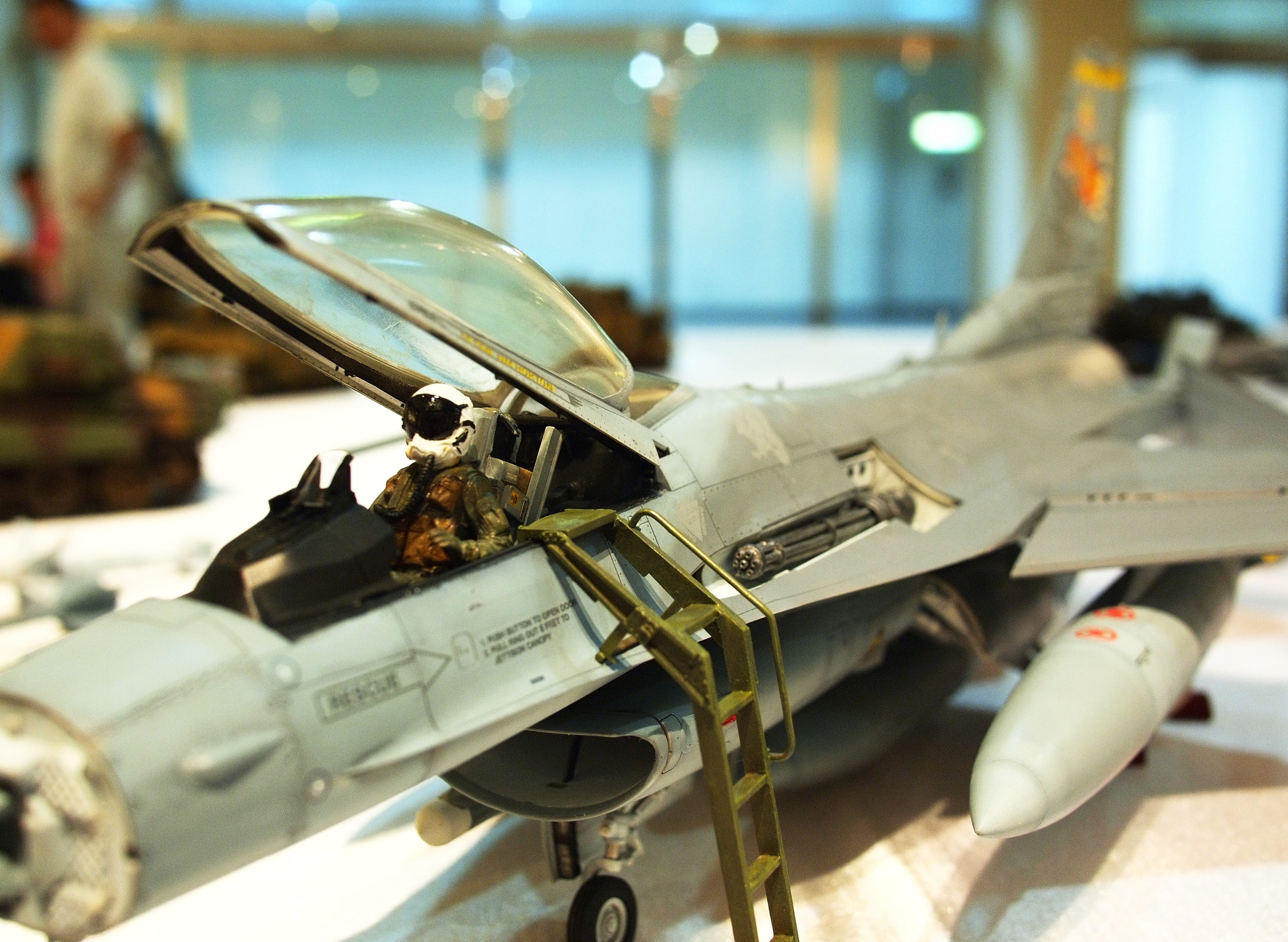 模型社成果展